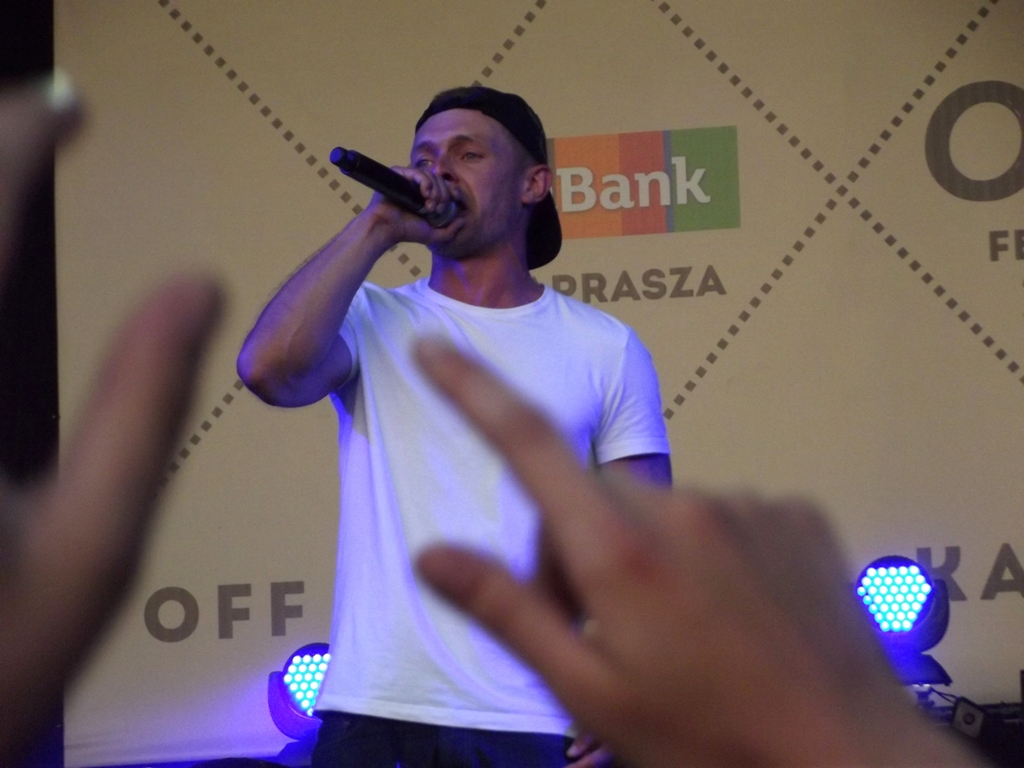 Zdjęcie zrobione podczas OFF Festival 2013 w katowickiej Dolinie Trzech Stawów.